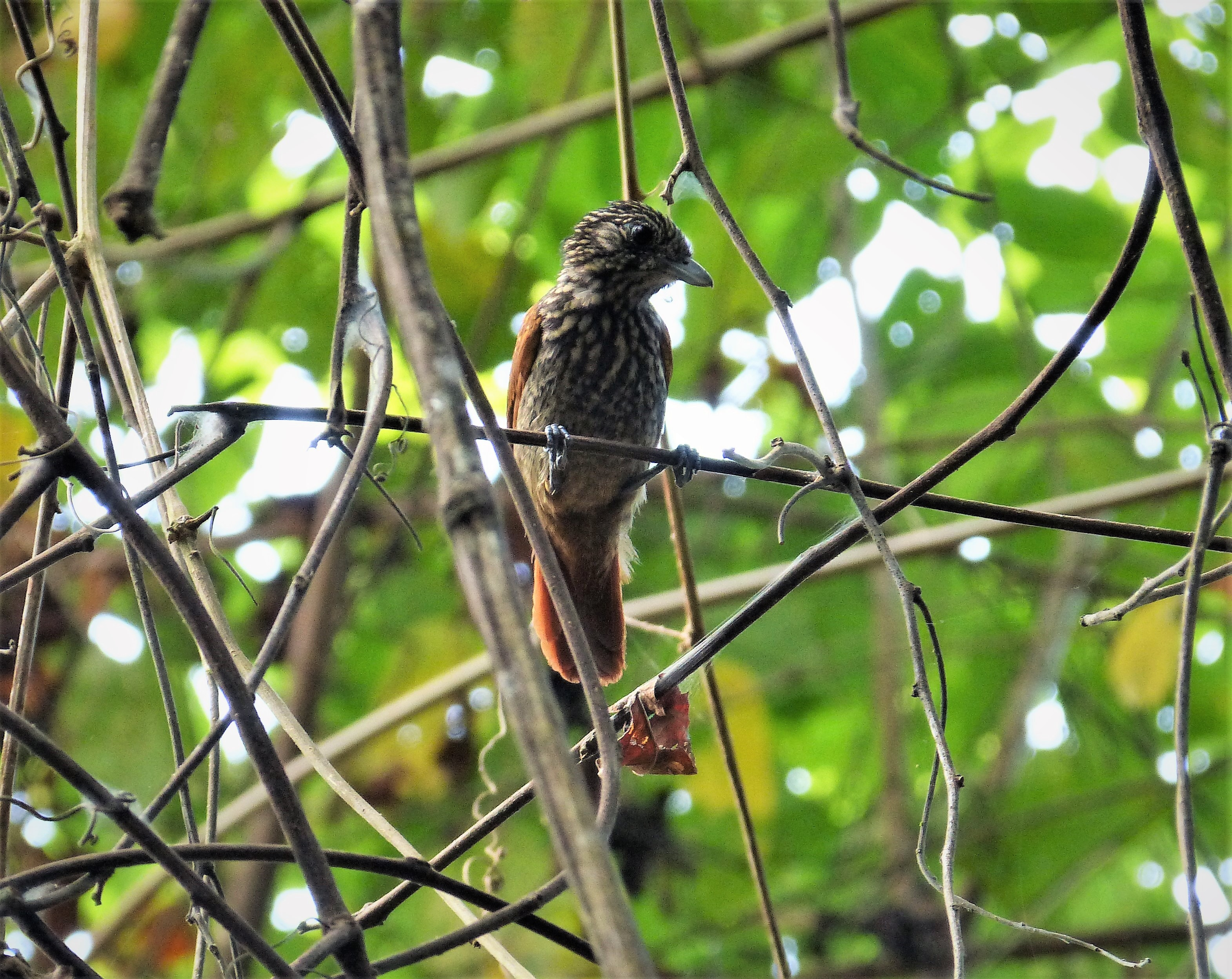 Vigia Garden, Nr Torti, Darien Province, Panama